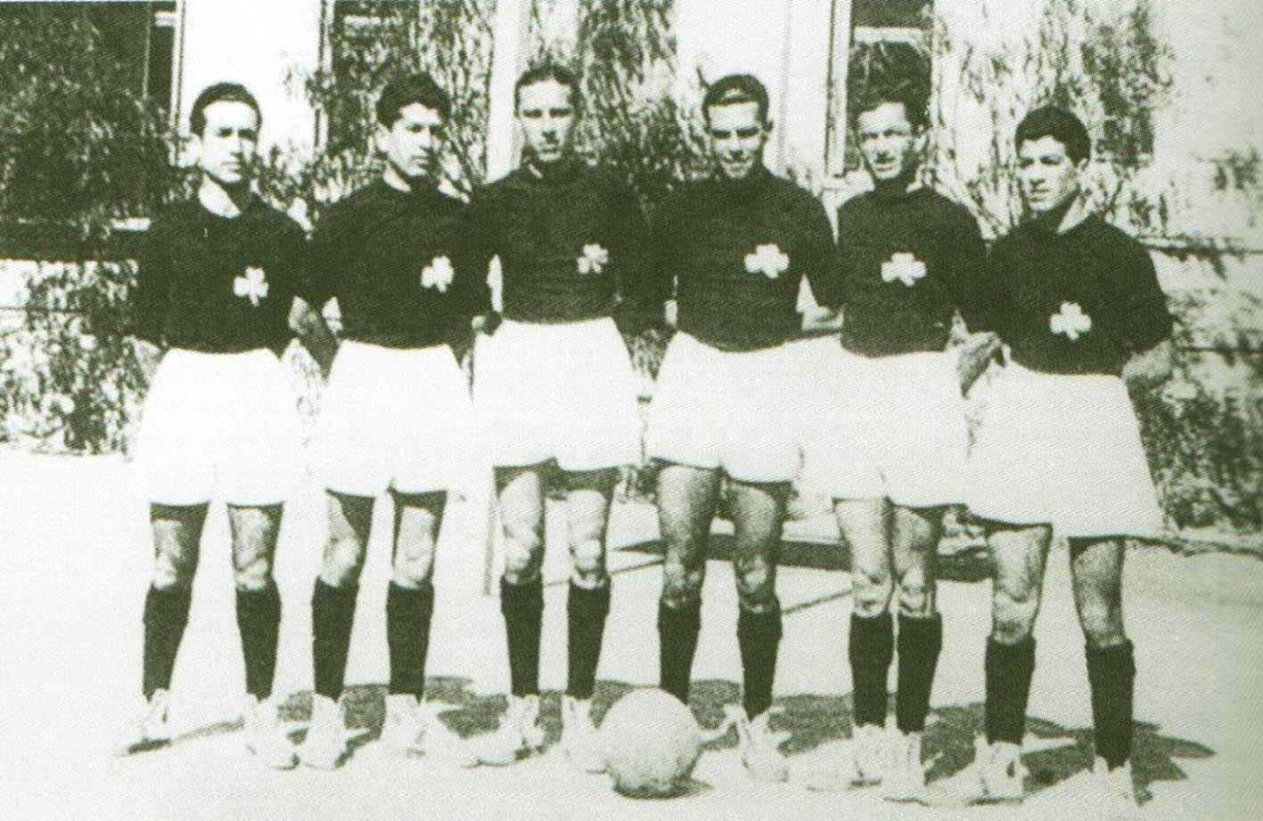 Η ομάδα καλαθοσφαίρισης του Παναθηναϊκού το 1940. Χάρης Κατελιάν, Πέτρος Πολυκράτης, Κακριδής, Αποστολίδης, Γιώργος Μποφίλιος, Νίκος Πολυκράτης